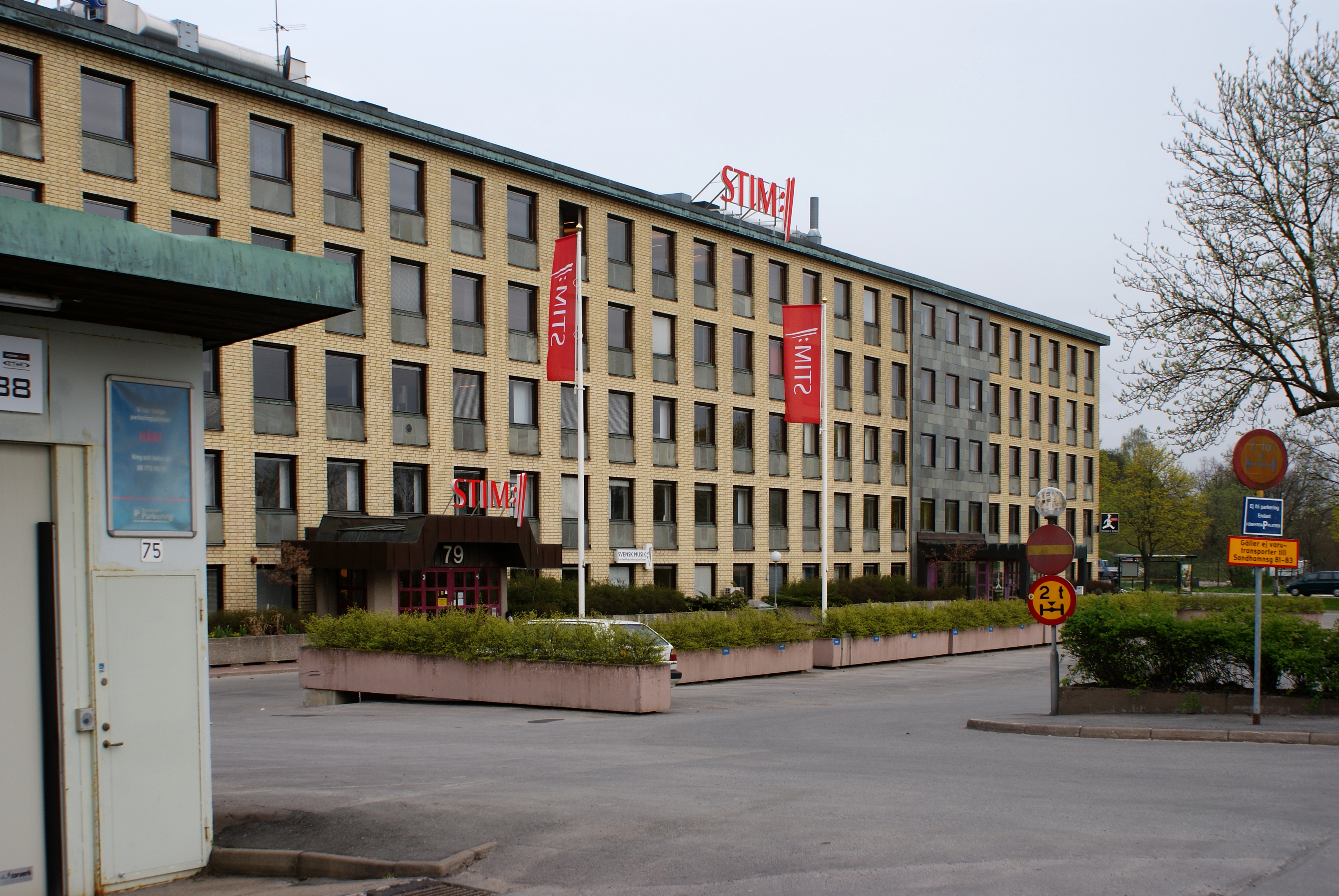 Tidigare kontorsbyggnad för Svenska Tonsättares Internationella Musikbyrå, (STIM) på Gärdet iStockholm. Stettin 7, byggnadsår 1963-64, arkitekt Bengt Asplund, ombyggt på 1980-talet. Rivet 2014